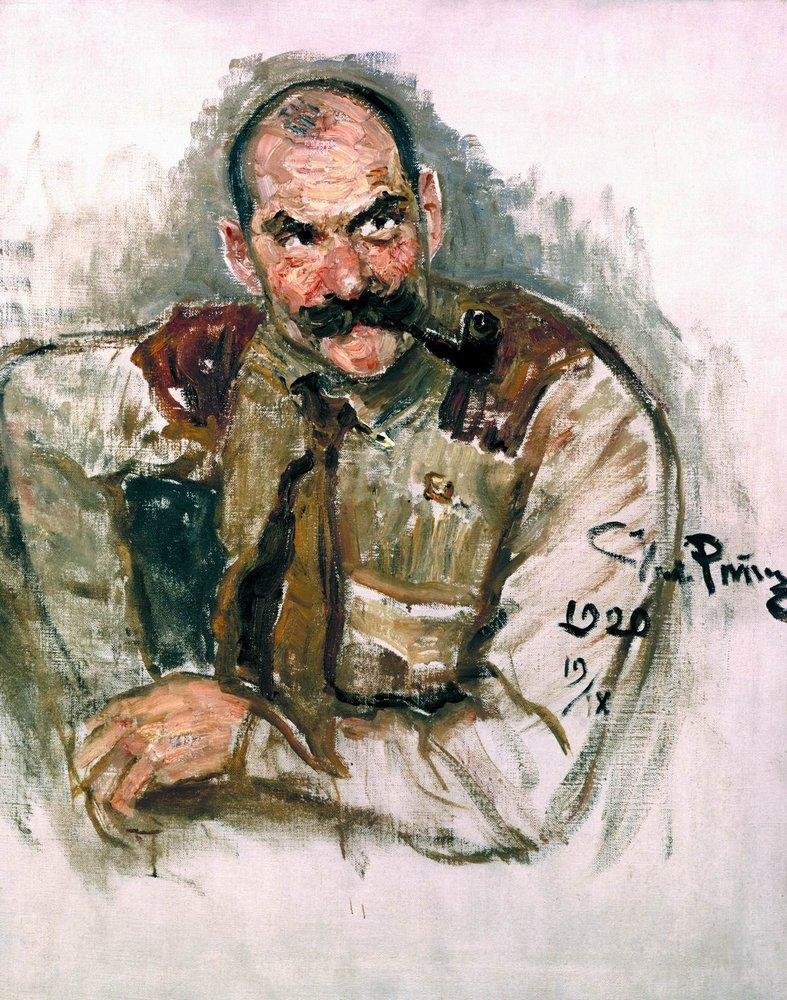 Портрет был написан 19 сентября 1920 года. В это время Илья Репин находился в Хельсинки по приглашению финской интеллигенции. Он вспоминал "Галлен приходил ко мне позировать с большим штофом коньяка в кармане". Портрет написанный всего за один сеанс был подарен музею "Атенеум".